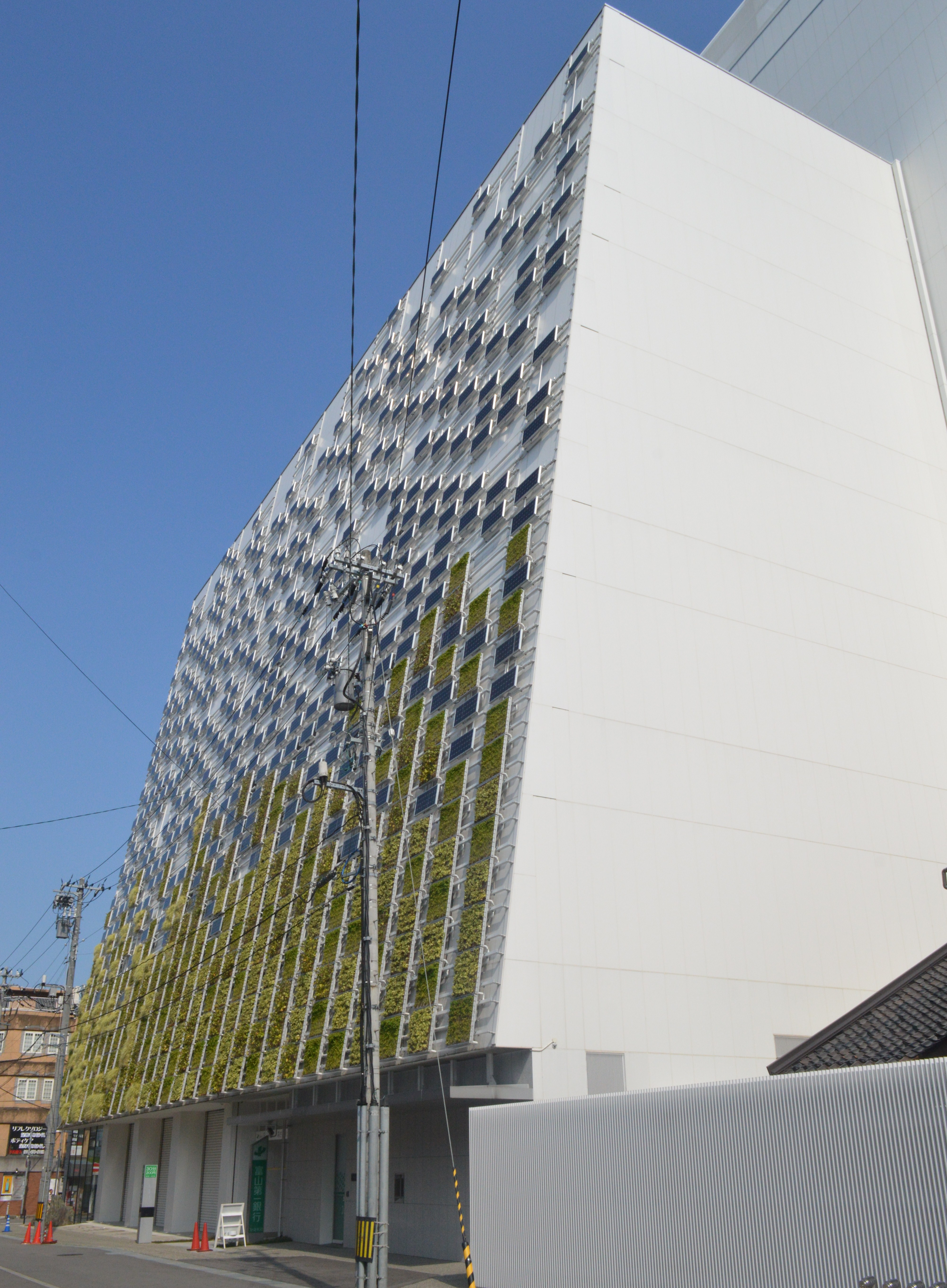 TOYAMAキラリ南面の壁面緑化システムと太陽光発電システム。